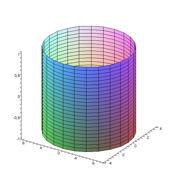 Graphe 3D cylindre elliptique